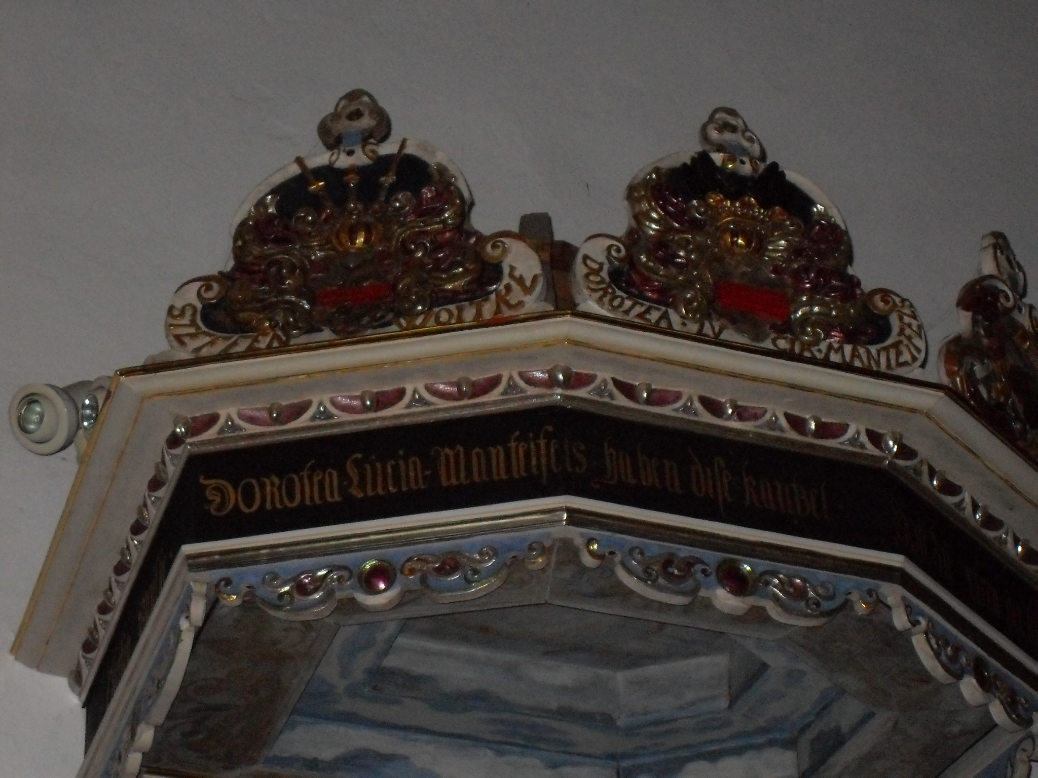 Wappendarstellung an der Kanzel